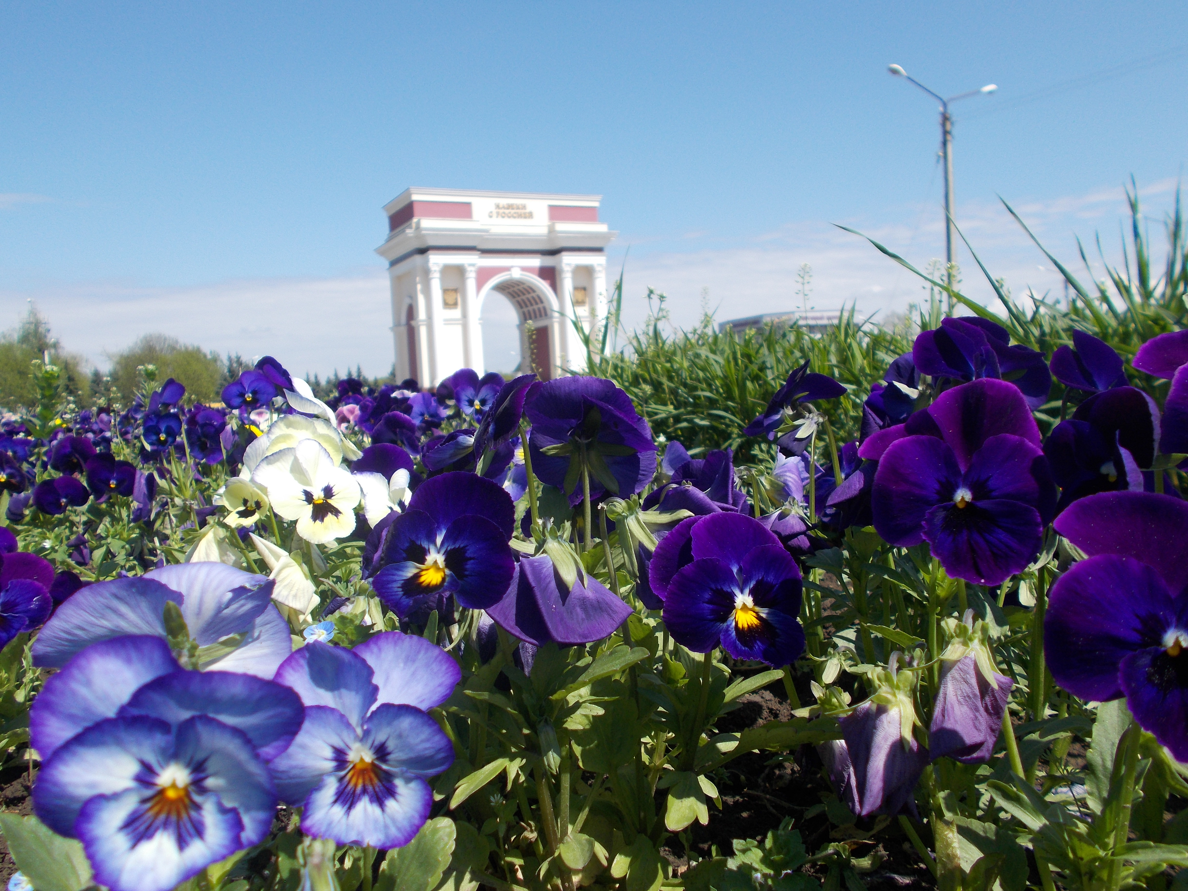 Нальчик, Нальчик This image is related to the protected area of Russia number 0700016